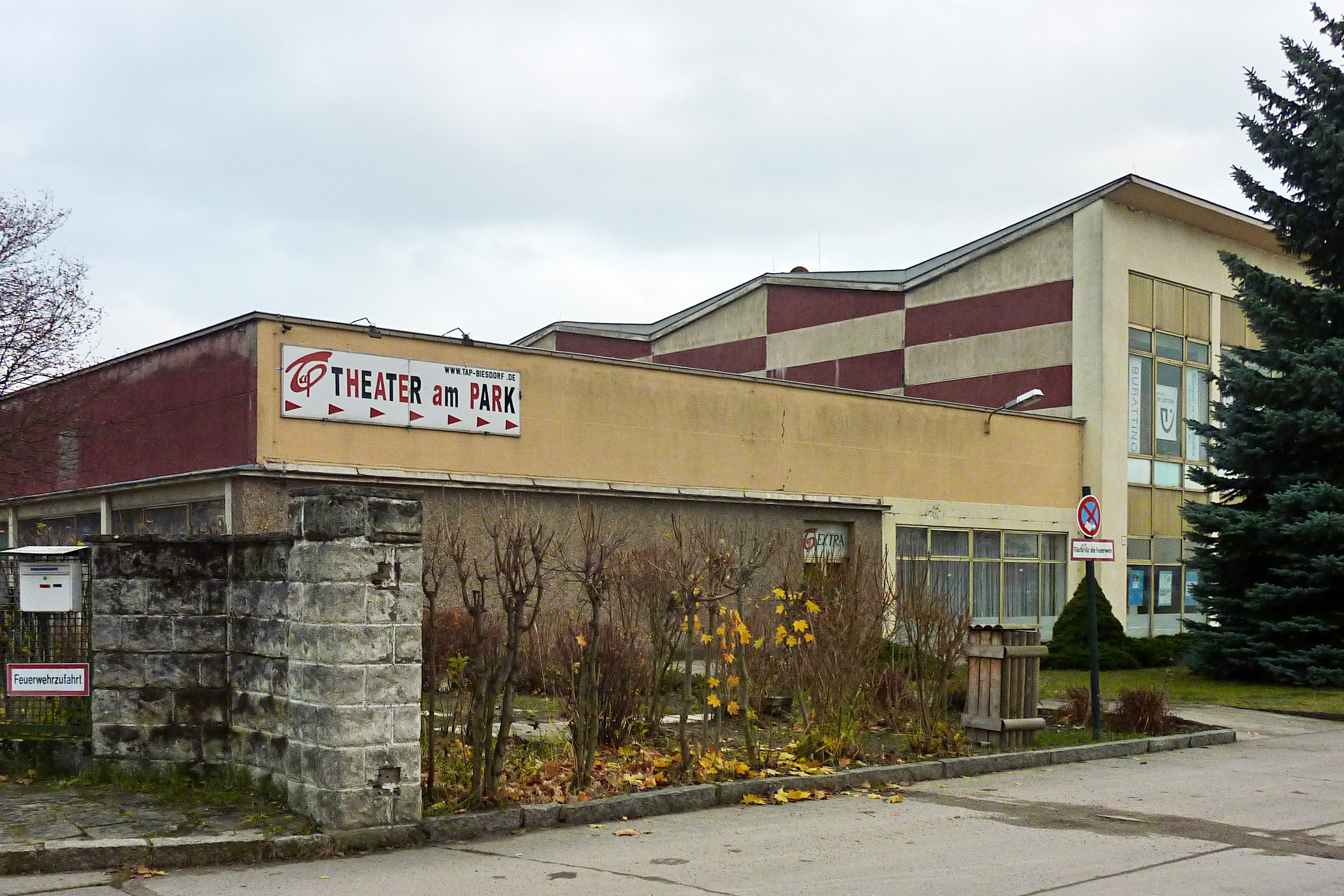 'Theater am Park' in Berlin-Biesdorf. Sicht von der Einfahrt am Frankenholzer Weg.